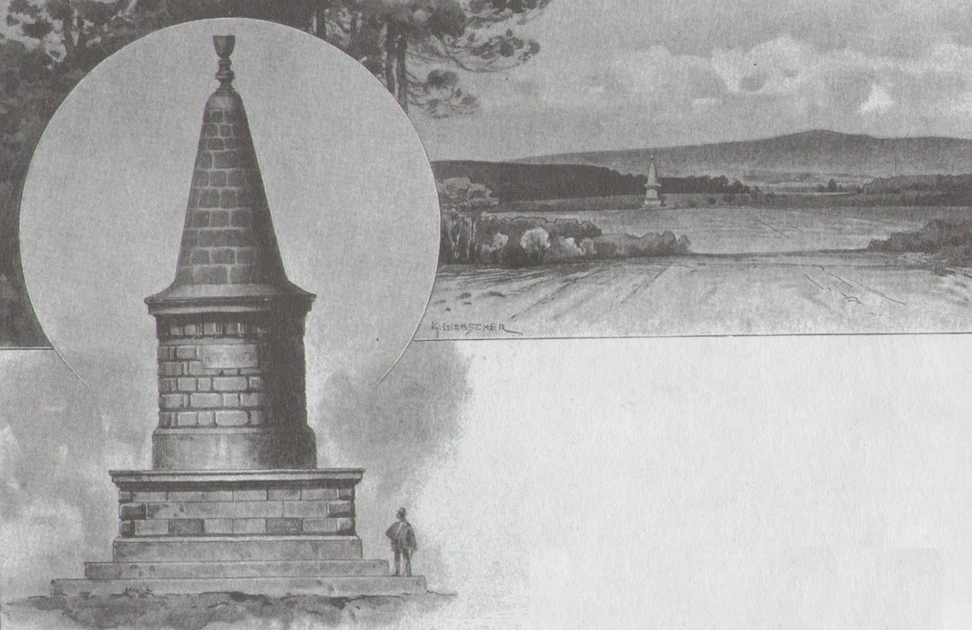 Mohyla Jana Žižky v dobové kresbě od Karla Liebschera